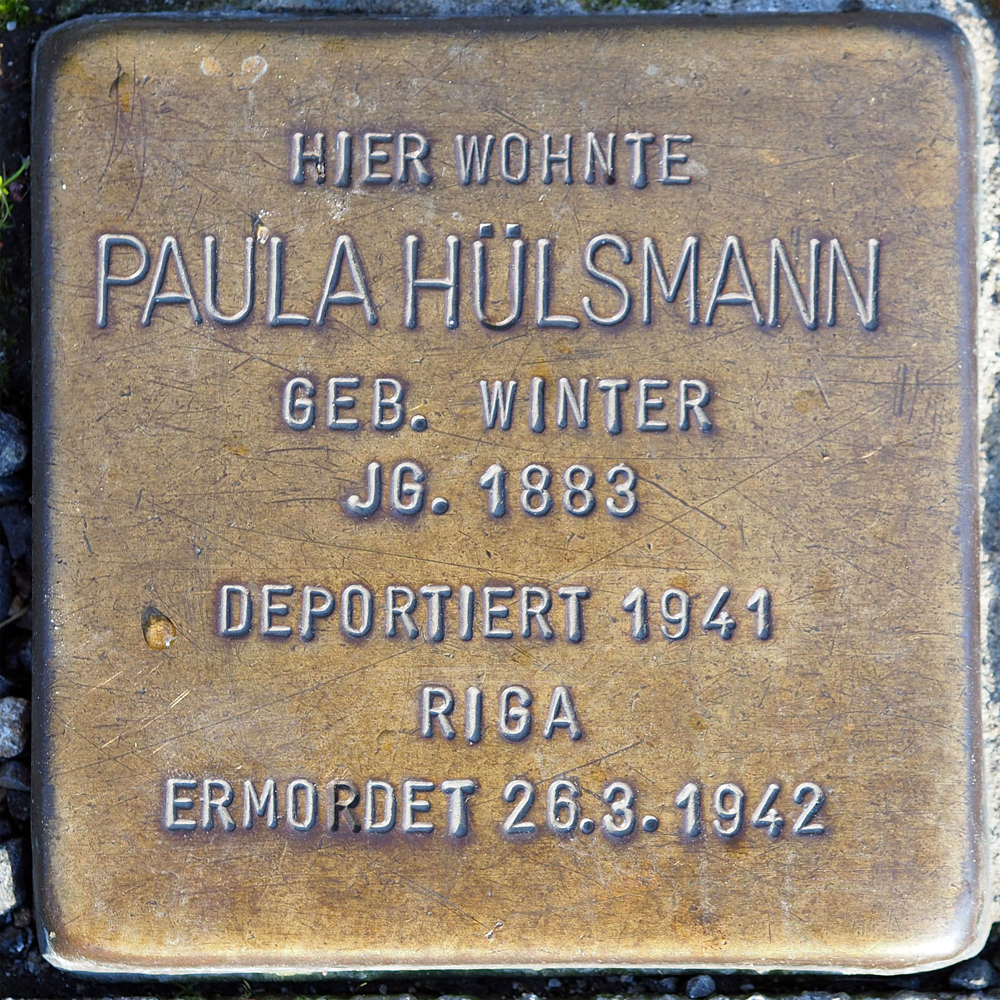 Stolpersteine MG: Hülsmann, Paula